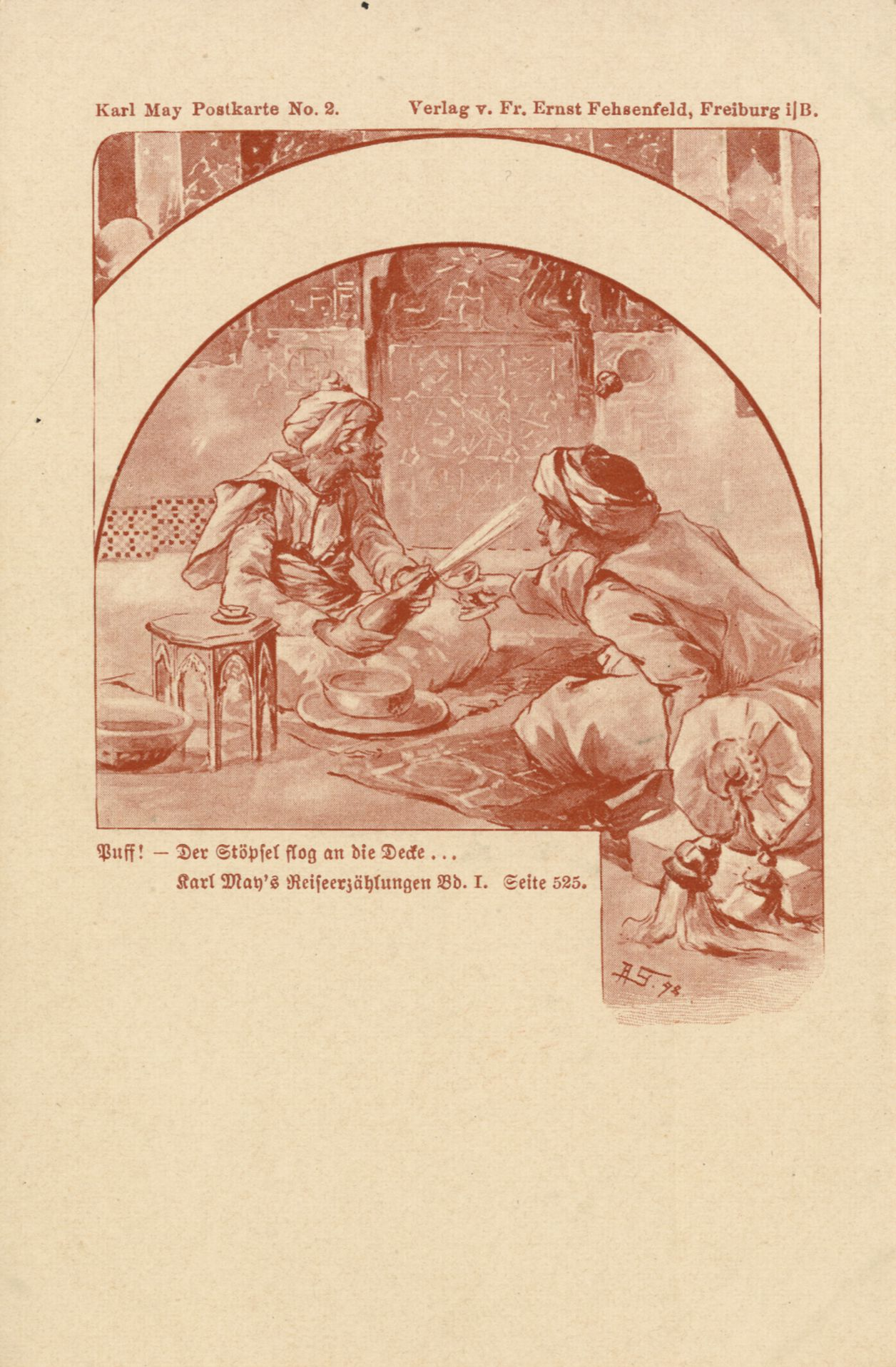 Kara Ben Nemsi und der Pascha von Mossul. Karl May Postkarte No. 2. Puff! - Der Stöpsel flog an die Decke..., Karl May’s Reiseerzählungen Bd. I (Durch Wüste und Harem, 1895 umbenannt in Durch die Wüste). Seite 525.